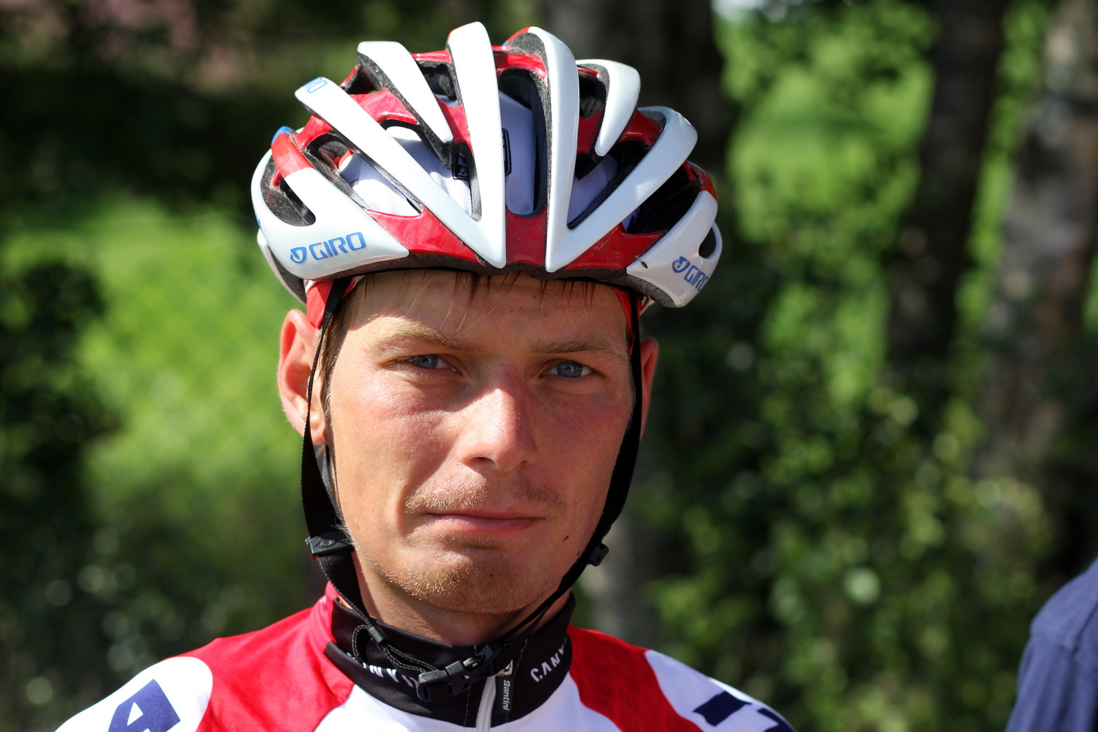 Sergey Nikolaev under Tour des Fjords 2013